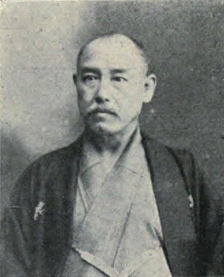 牛乳搾取業楽牛園 牧田義雄 駒込林町 現・文京区千駄木5